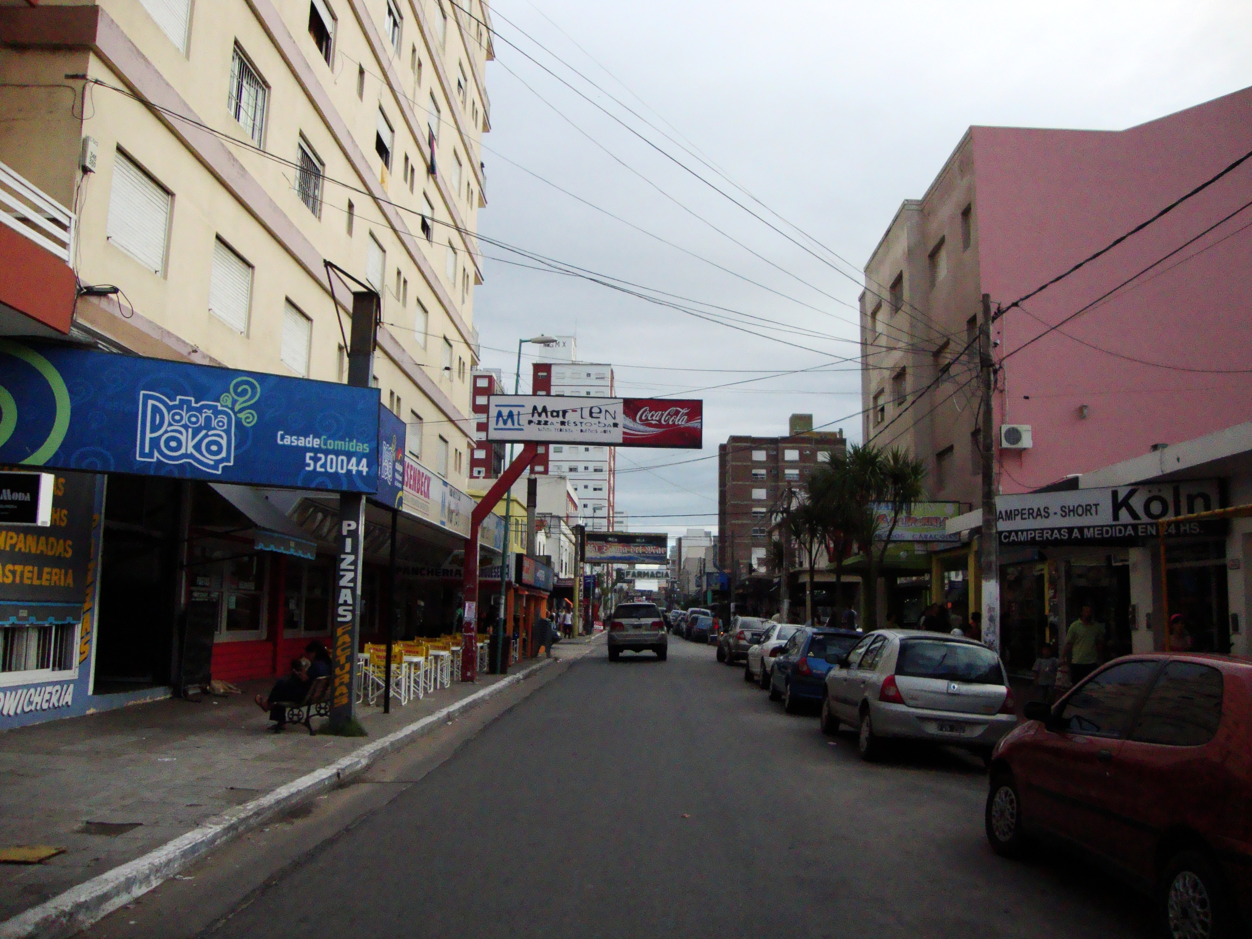 Calle dos, con vista al sur, por la tarde. Santa Teresita, Buenos Aires.